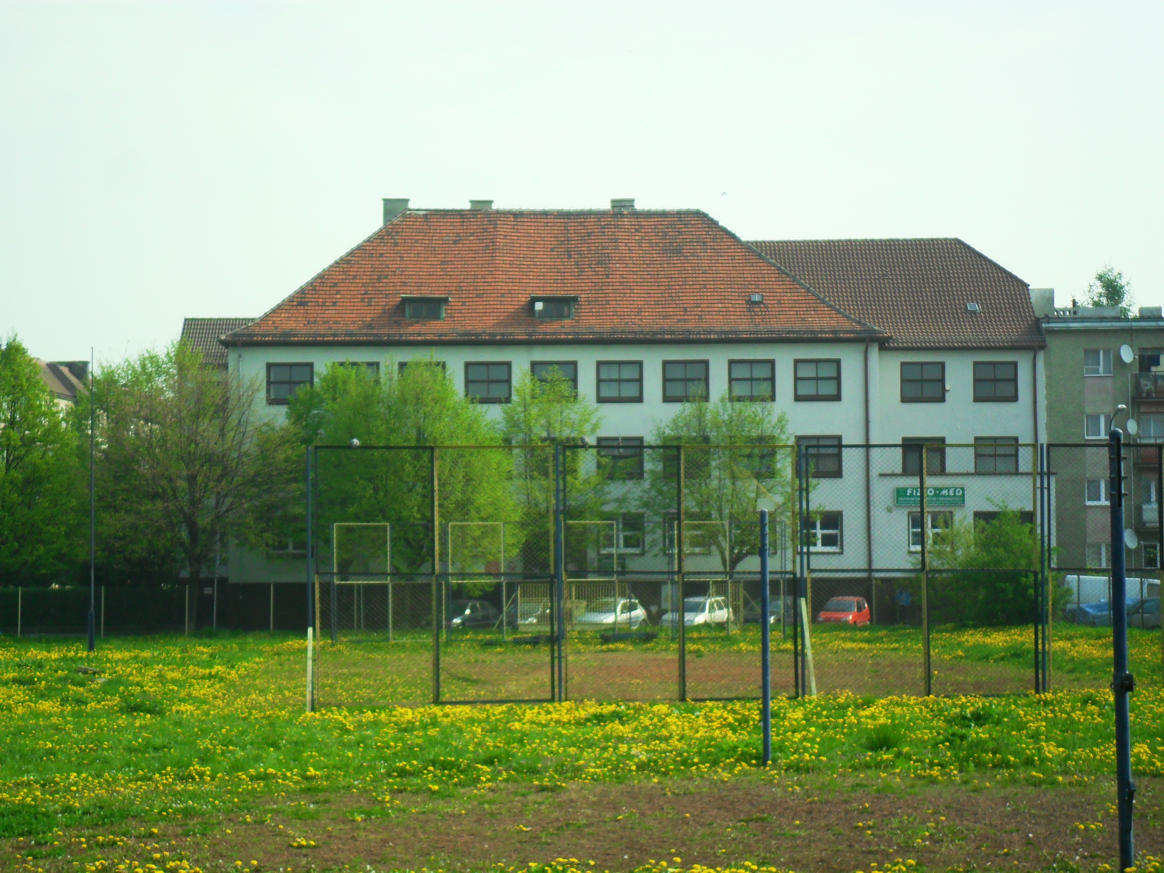 Budynek zwany popularnie "Słoneczkiem" na rogu ulic Lwowskiej i Wileńskiej w Raciborzu.